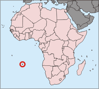 Landkarte Afrikas, St. Helena hervorgehoben, selbst erstellt